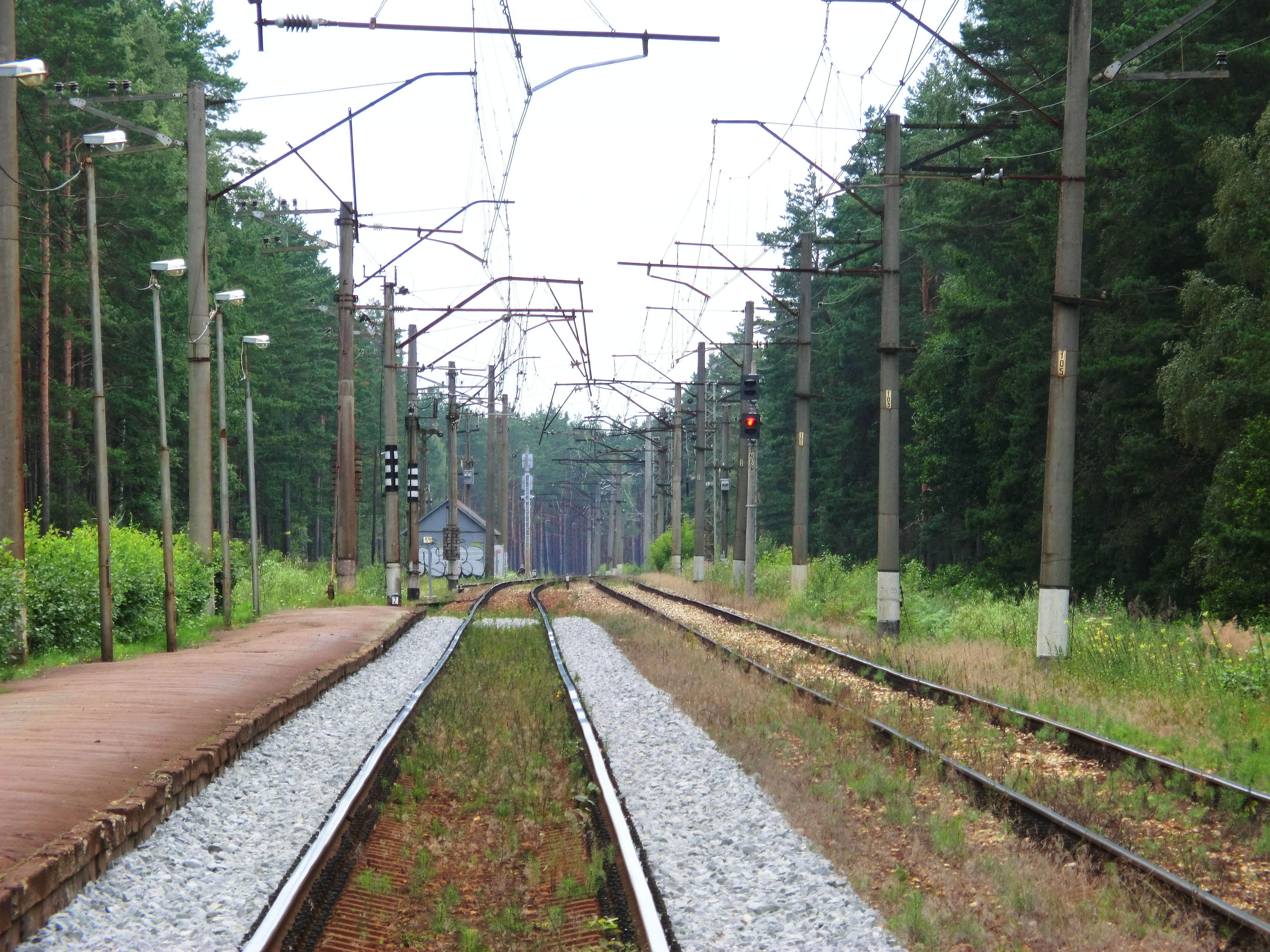 о.п. Инчупе (3)